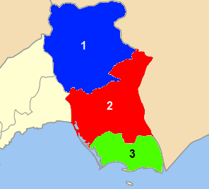 Χάρτης με τις ενότητες που αποτελούν τον Δήμο Νέστου